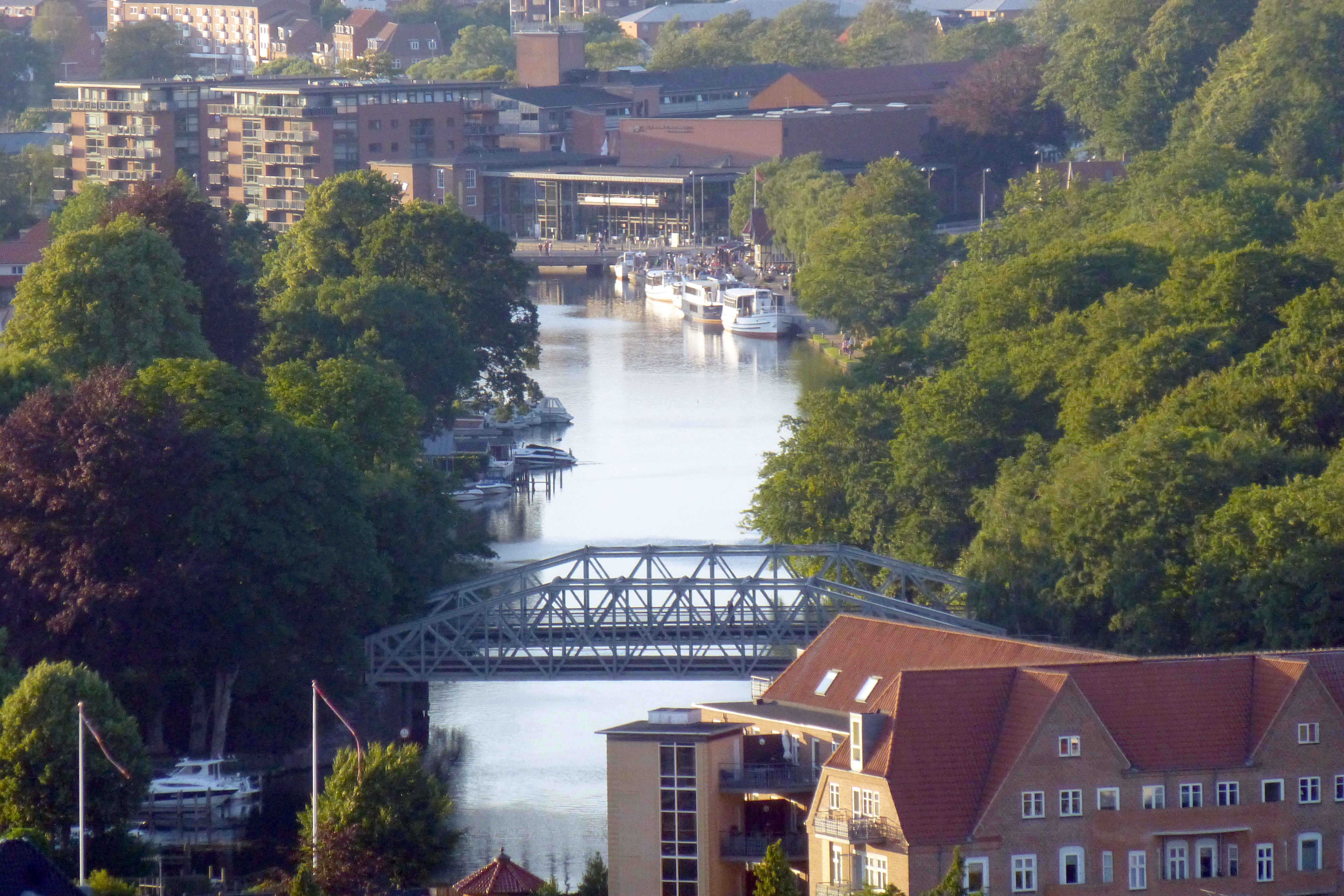 Remstrup Å set fra syd